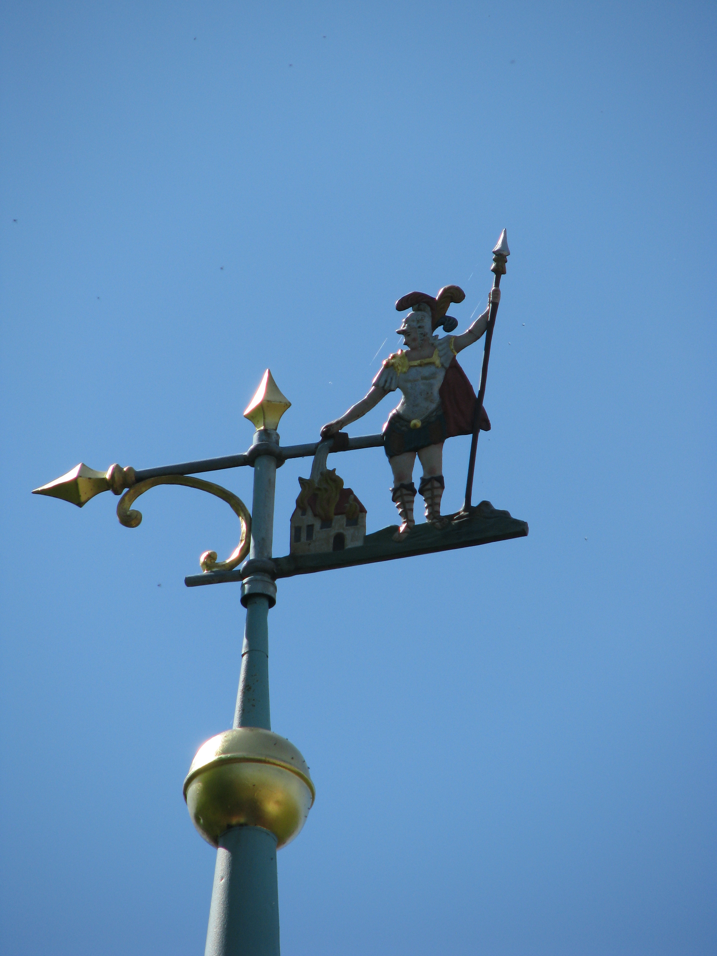 Loderbach, Ortsteil der Gemeinde Berg bei Neumarkt in der Oberpfalz,Turmspitze des Feuerwehrhauses mit St. Florian-Figur